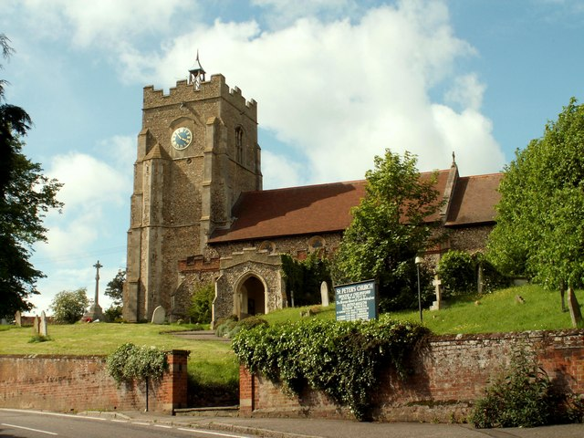 St. Peter's church, Sible Hedingham, Essex